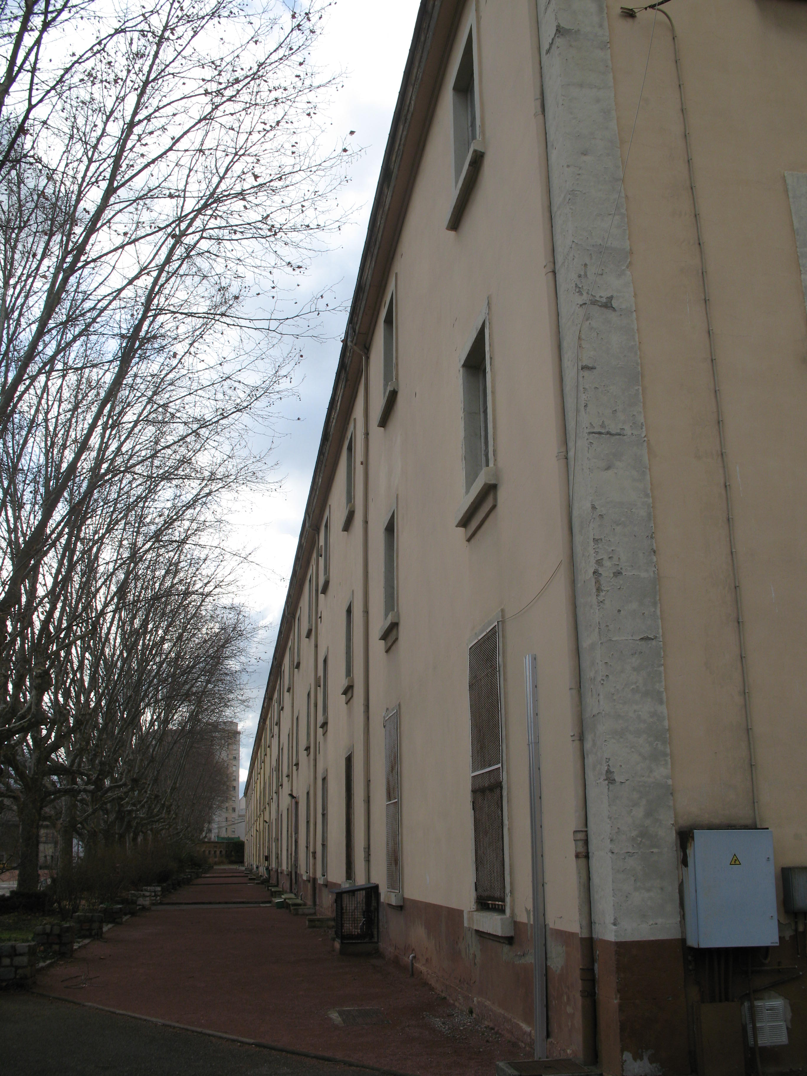 Caserne sergent Blandan dans le 7ème arrondissement de Lyon.